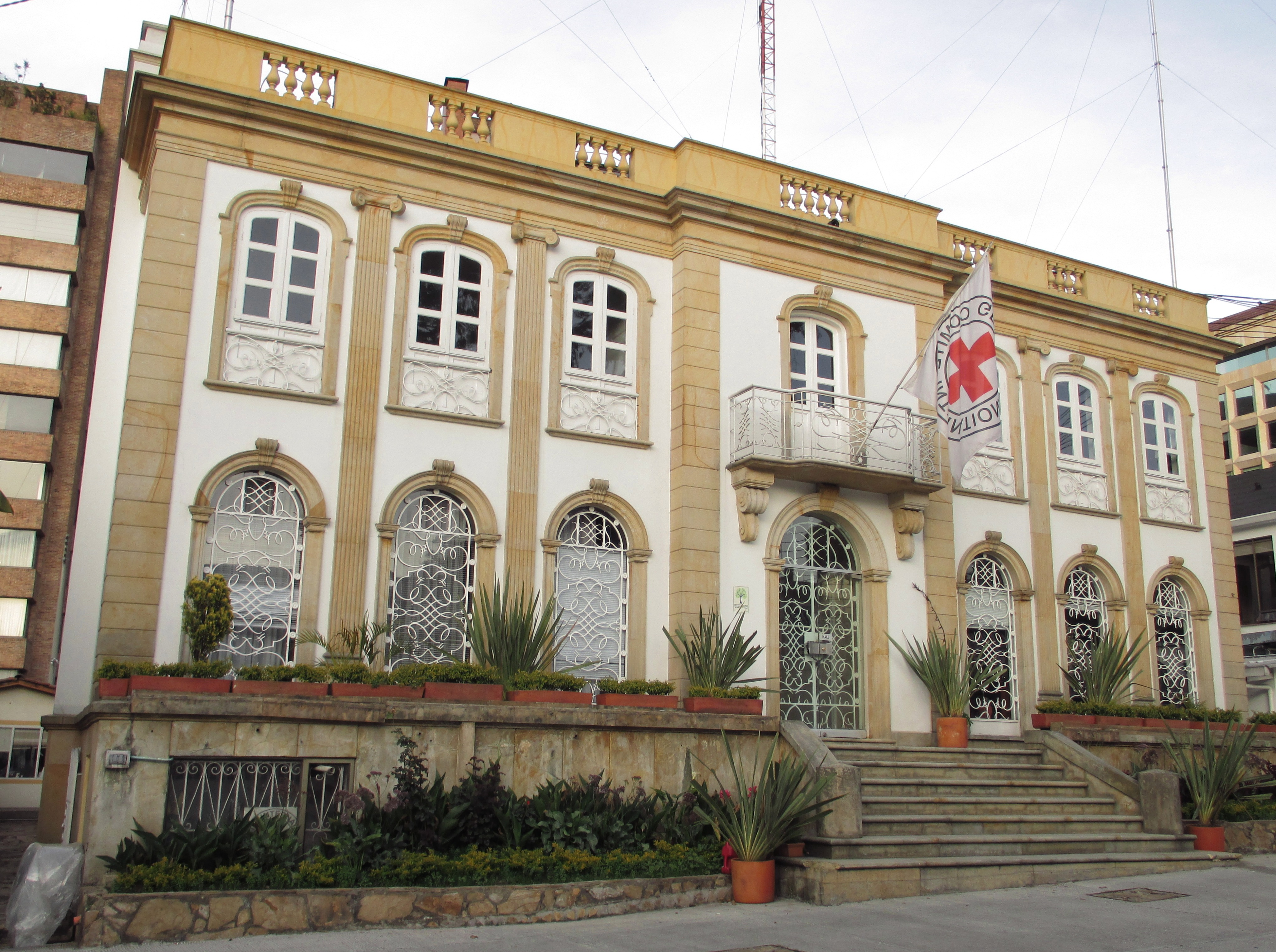 Bogotá